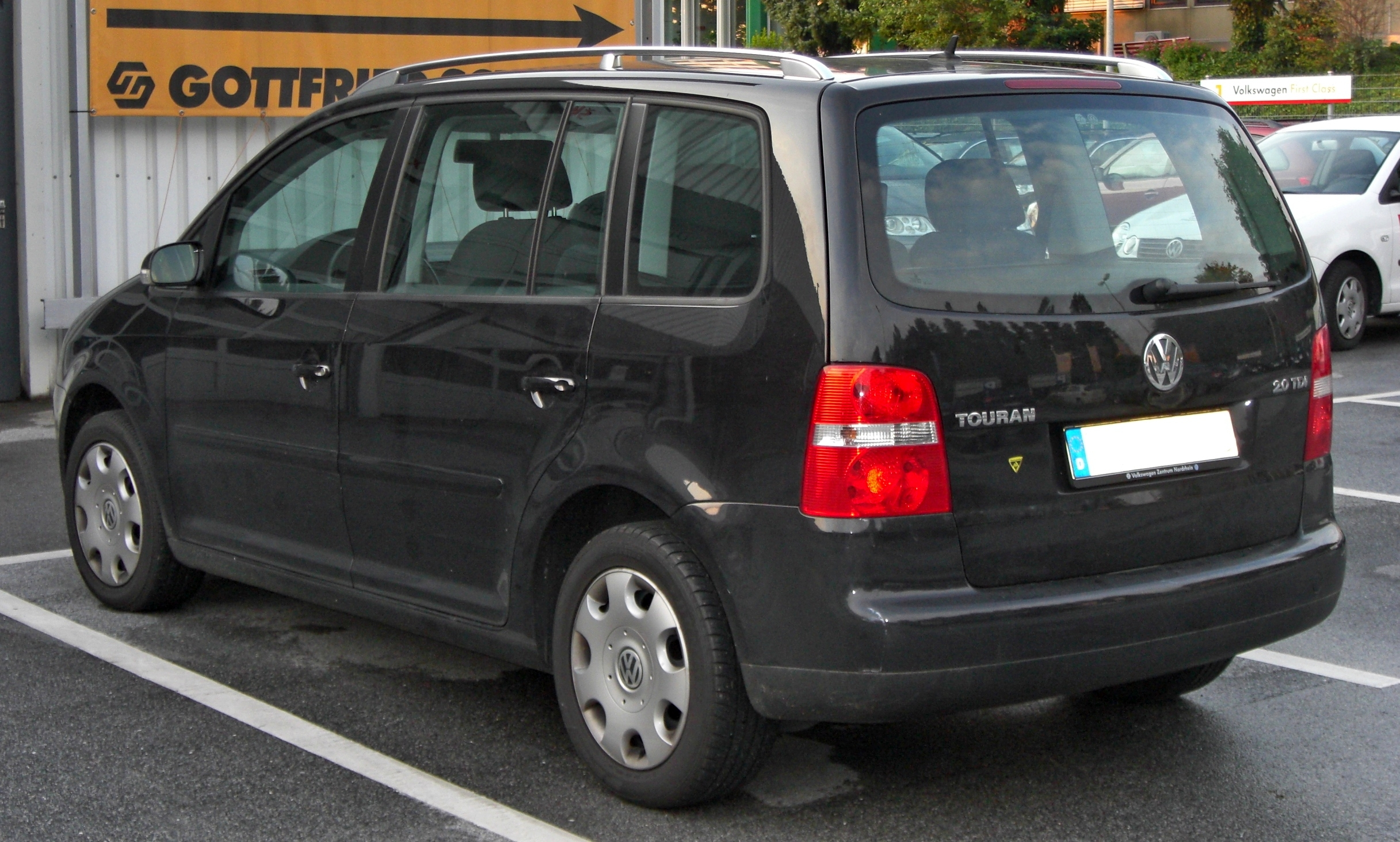 VW Touran